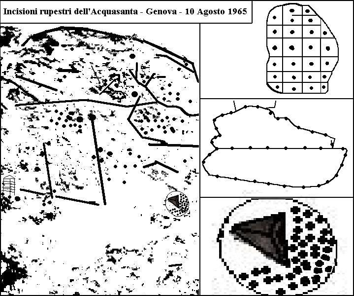 Acquasanta - Genova - Italia - 1965 - Pietra coppelle